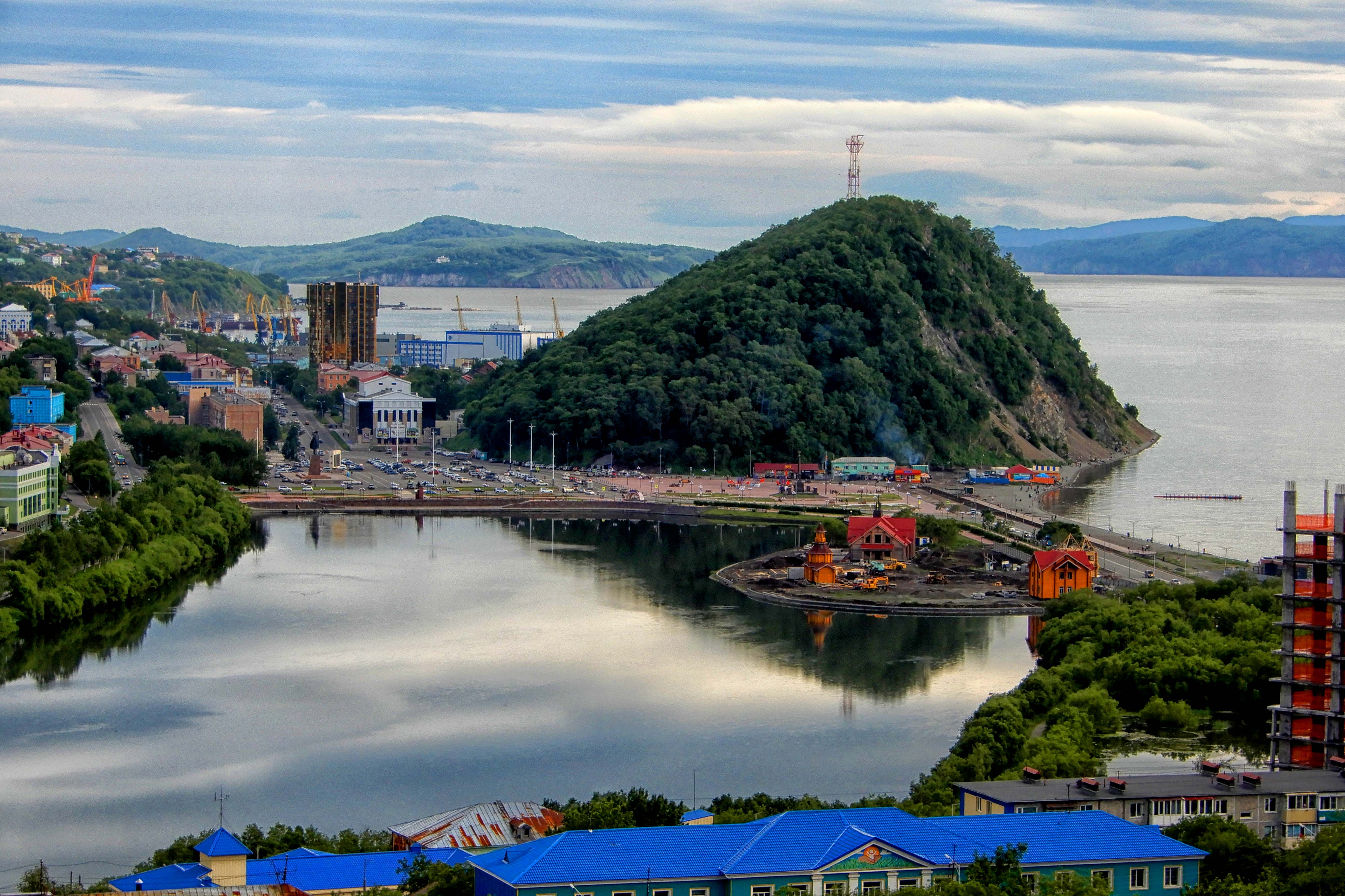 Место обороны города от нападения англо-французской эскадры в 1854 г.: улица Ленинская, Никольская сопка, Петропавловск-Камчатский, Камчатский край